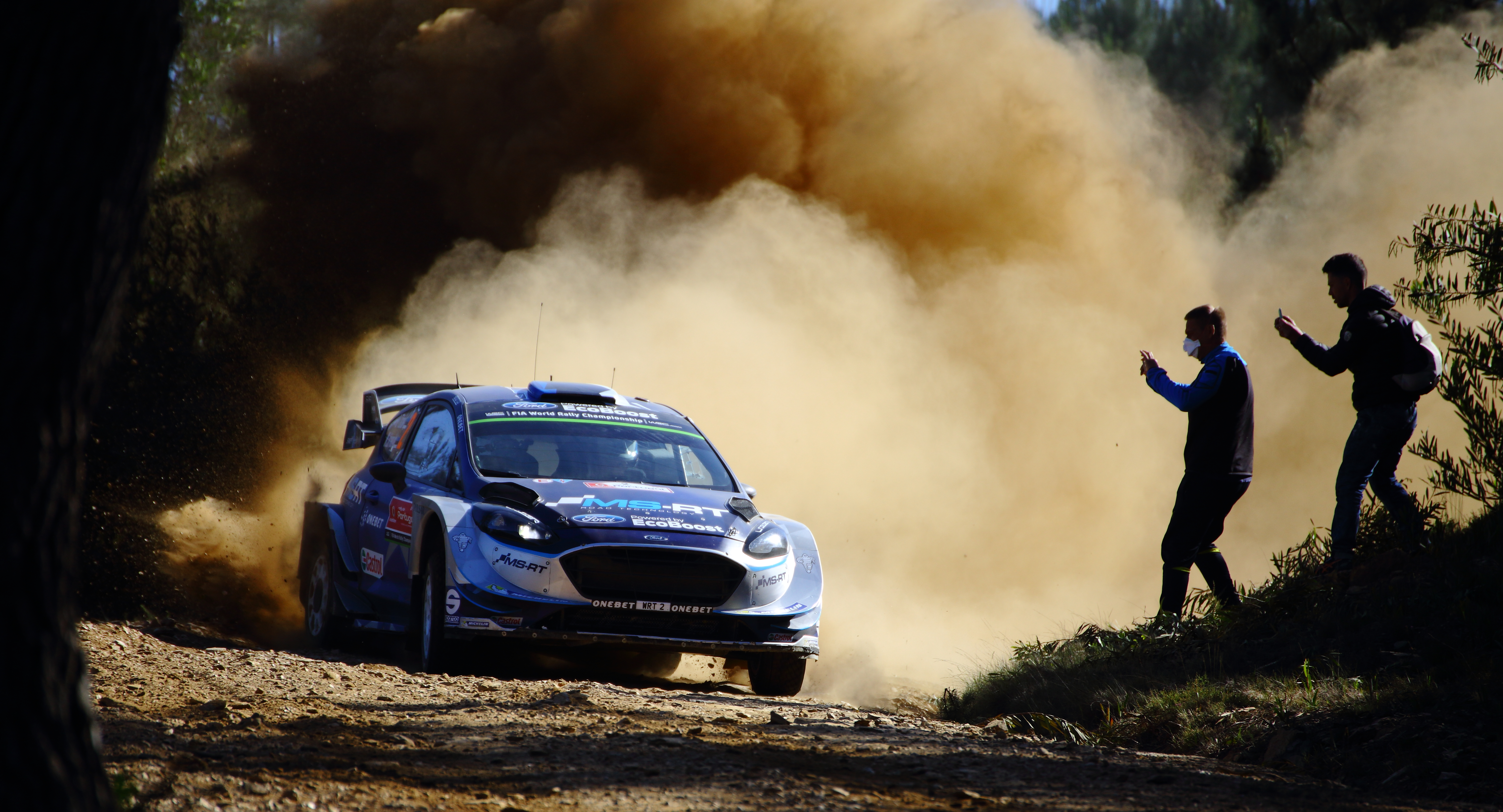 2017 Rally Portugal